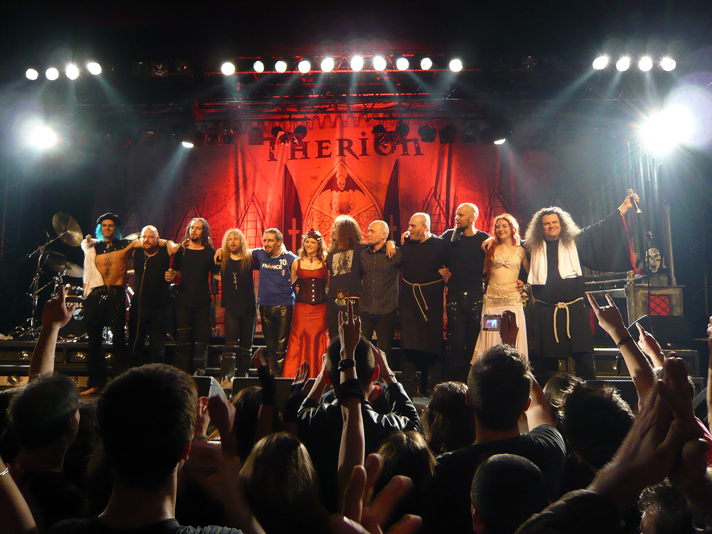 Therion 22/12/07 Elysée Montmatre (Paris)